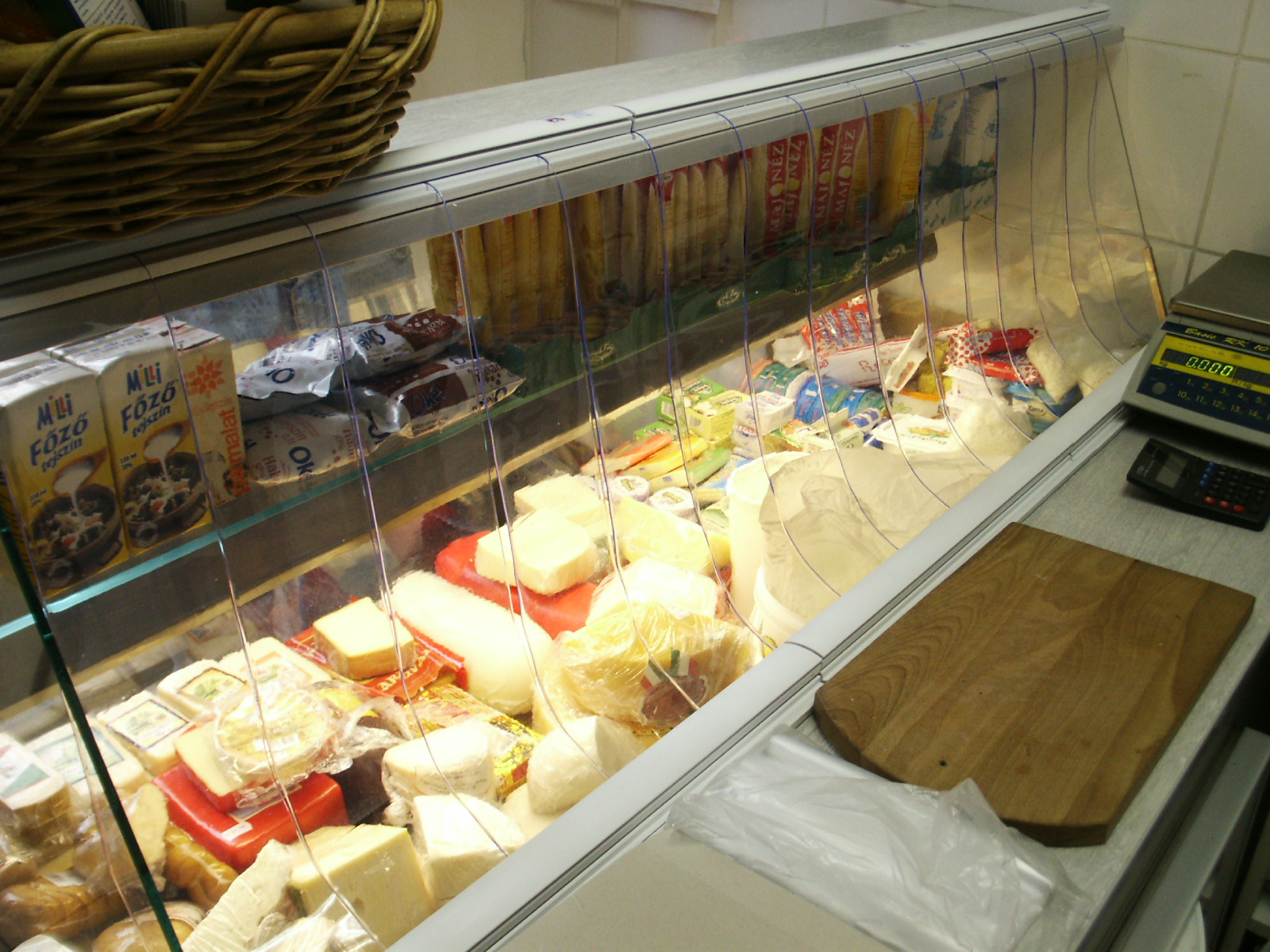 Hűtőpultra helyezett ipari szalagfüggöny (Pécs)